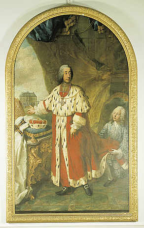 Links im Hintergrund Schloss Falkenlust. Clemens August mit allen Zeichen seiner geistlichen und weltlichen Herrschaft: Kurmantel und Kurhut stehen für das Kurfürstentum Köln, das auf der Brust hängende bischöfliche Pektorale, der Kragen des Priesterornats und die auf dem Tisch hinter dem Kurhut liegende Mitra versinnbildlichen sein Amt als Erzbischof von Köln.